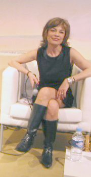 Nicole Calfan au Salon du Livre Porte de Versailles à Paris.